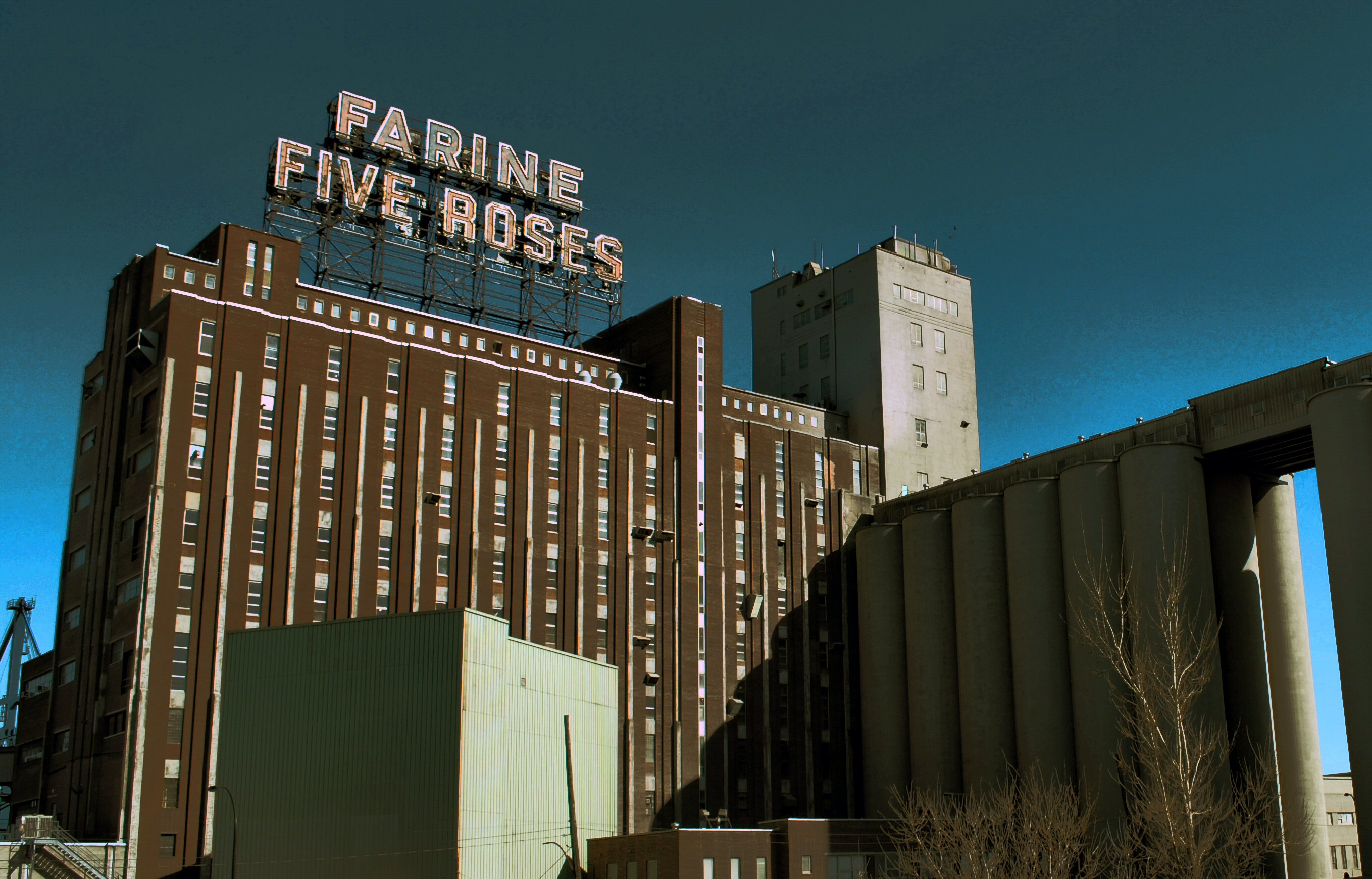 Usine et silos de la compagnie Farine Five Roses dans le Vieux-Port de Montréal